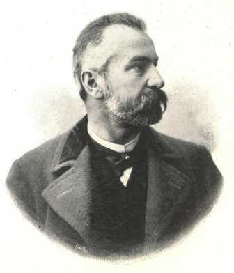 Czigler Győző (1850–1905) építész portréja